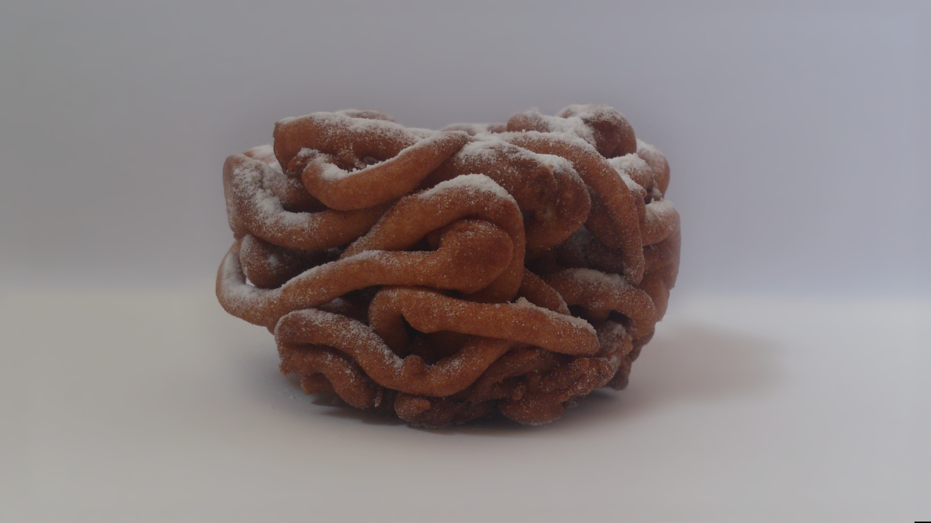 Finsk struva som äts runt den 1:a maj. Man brukar även dricka mjöd till detta delikata bakverk.